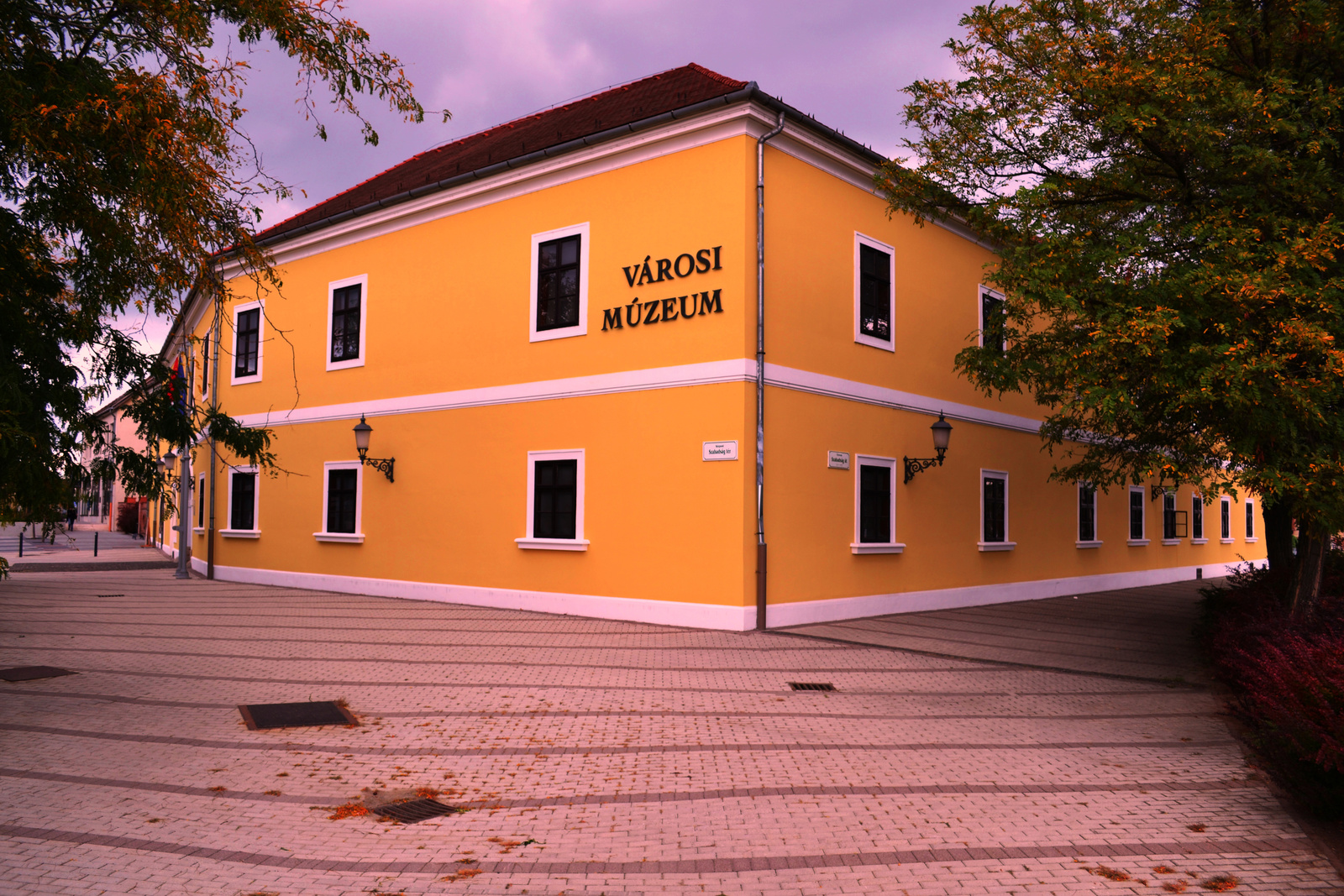 Helytörténeti Gyűjtemény, volt Hamvay-kúria (Gödöllő, Szabadság tér 5.)